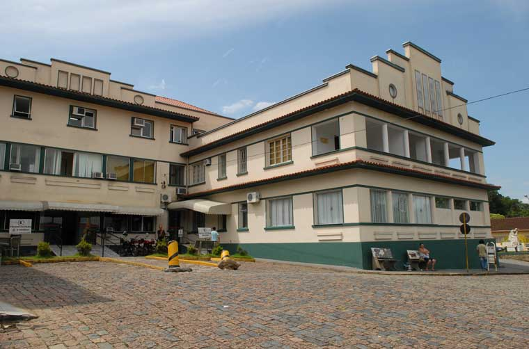 Fachada do Hospital Municipal Santo Antônio.